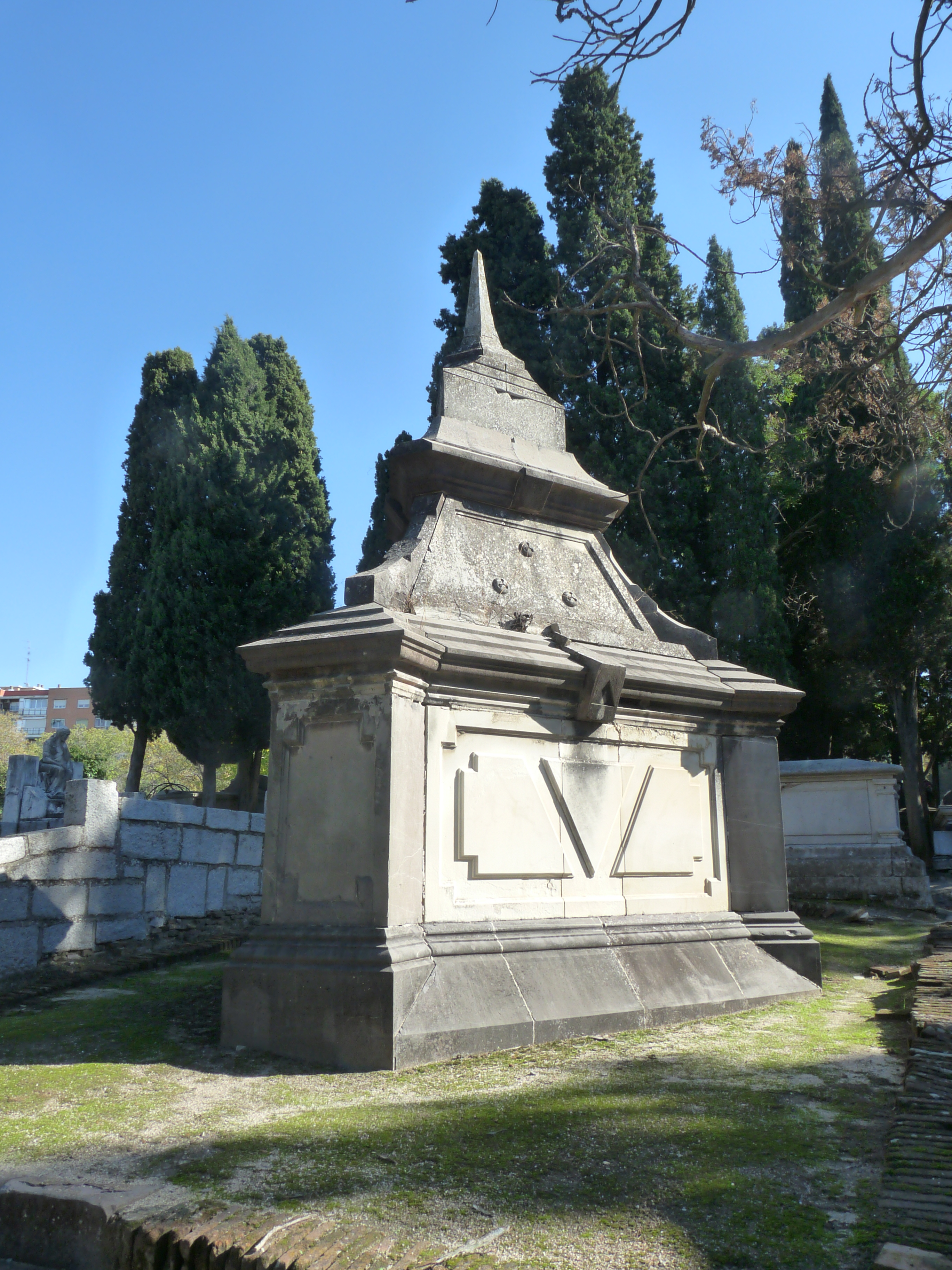 Mausoleo de Ramón Chíes, cementerio civil de Madrid.